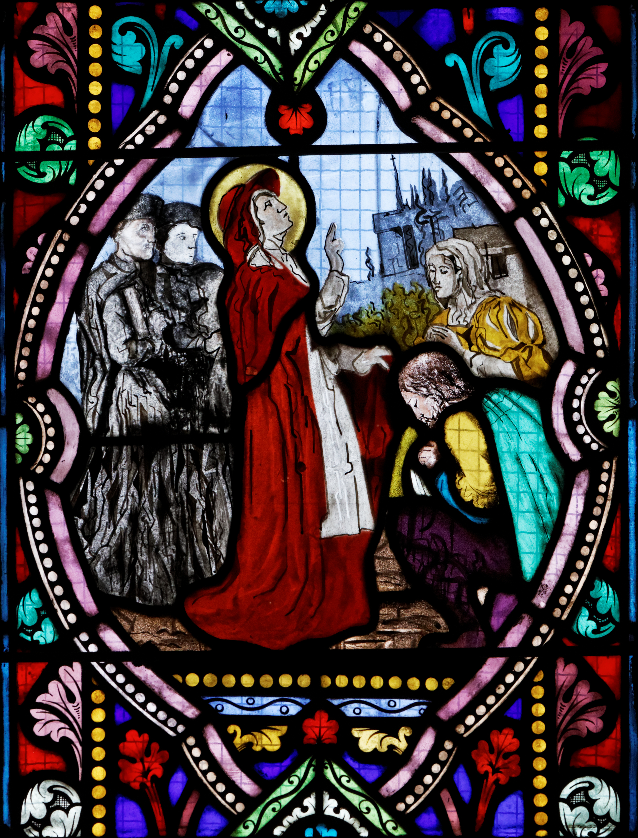 La cathédrale Saint-Corentin à Quimper dans le Finistère.